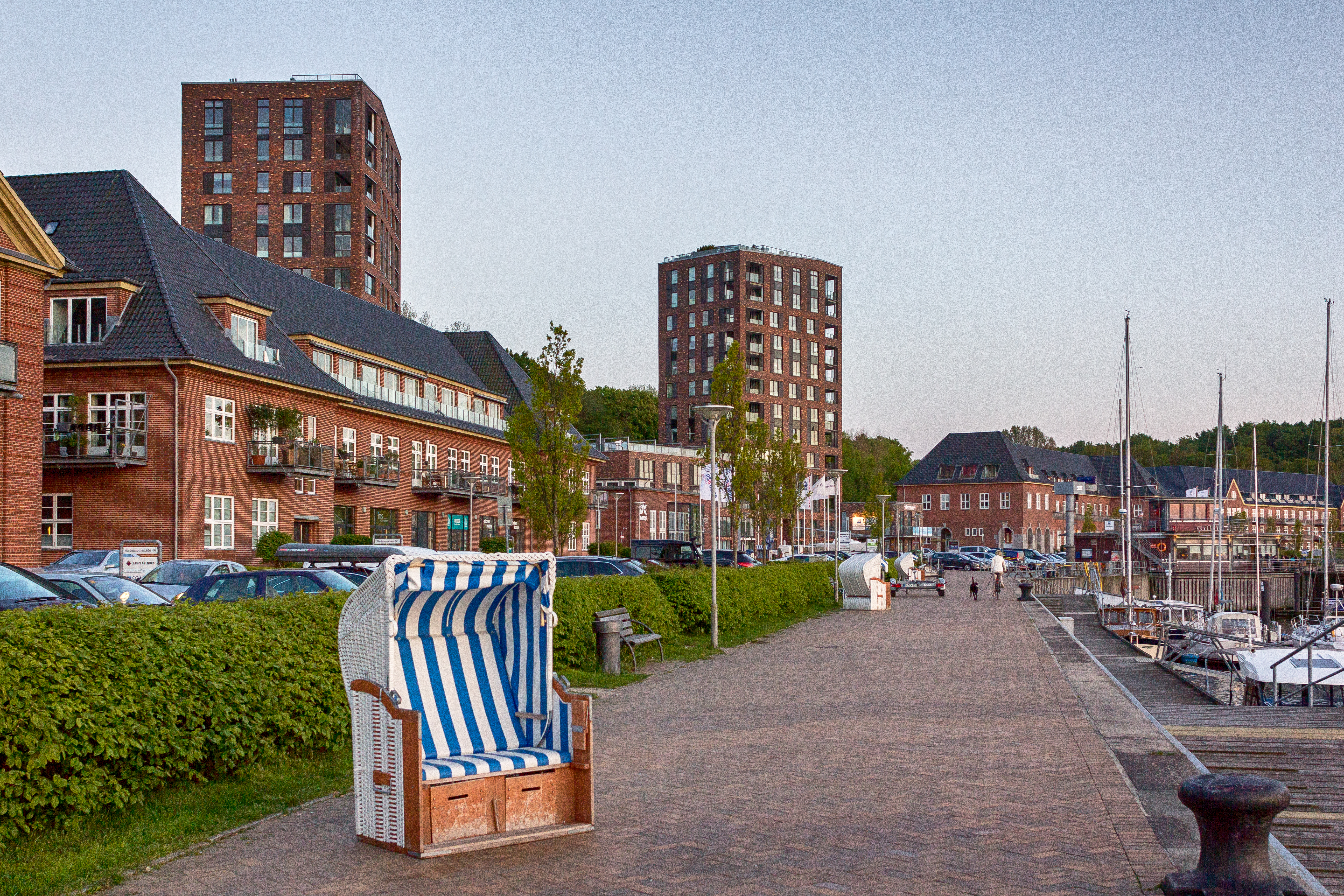 Die beiden Türme - Lee und Luv - in Sonwik, 2015.